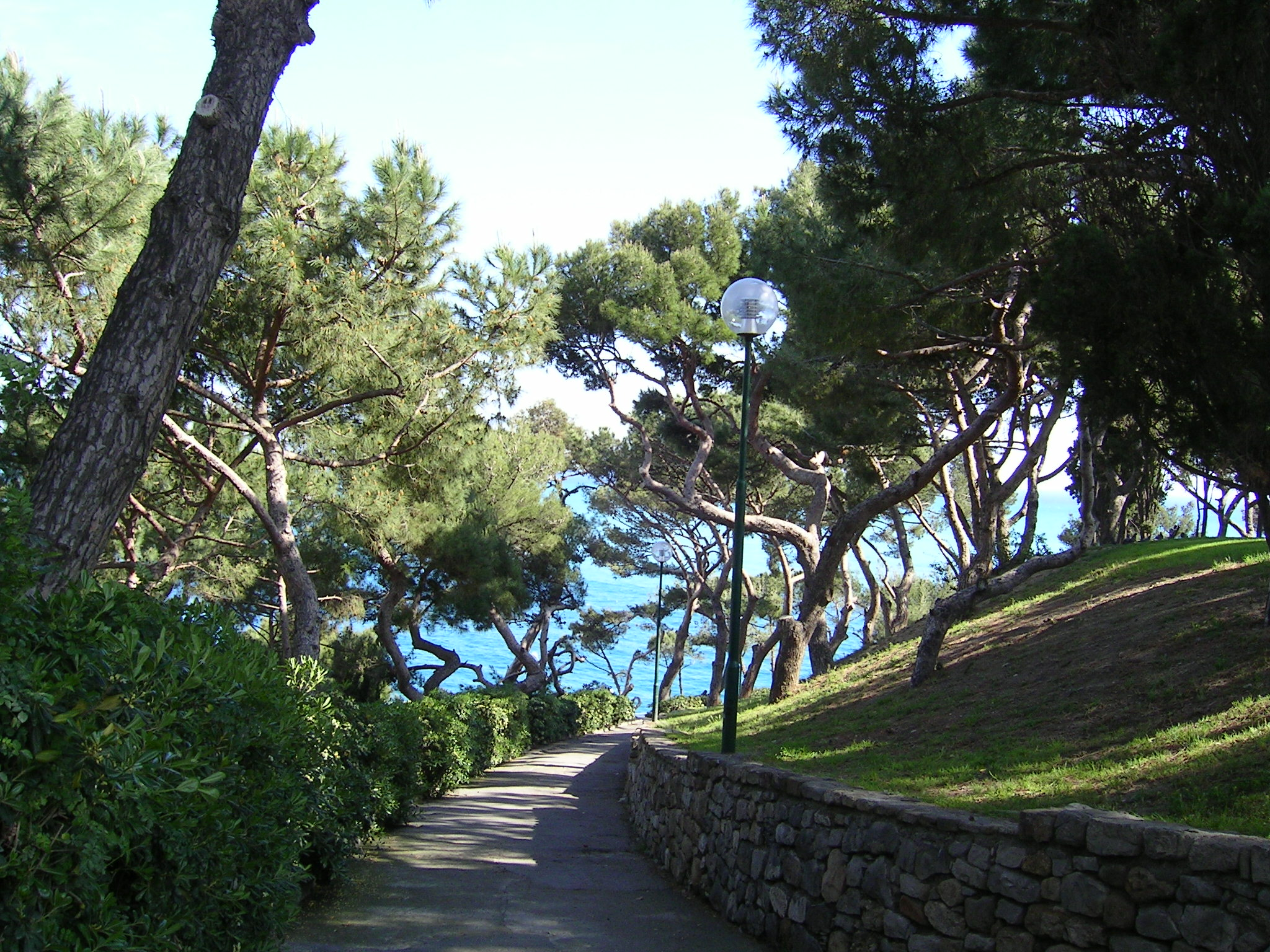 Immagine panoramica di Bordighera (Via Stella Maris, foto scattata dall'autore nel maggio 2004), in provincia di Imperia (Italia)